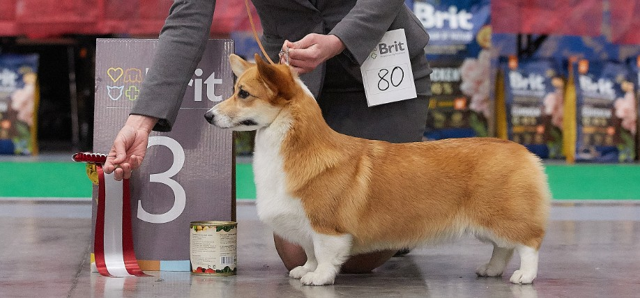 Welsh Corgi Pembroke. St. Petersburg